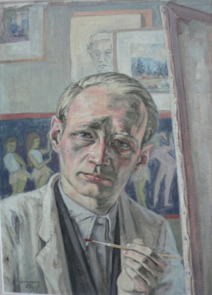 Ölbild "Selbstbildnis 1956" von Eberhard Werner